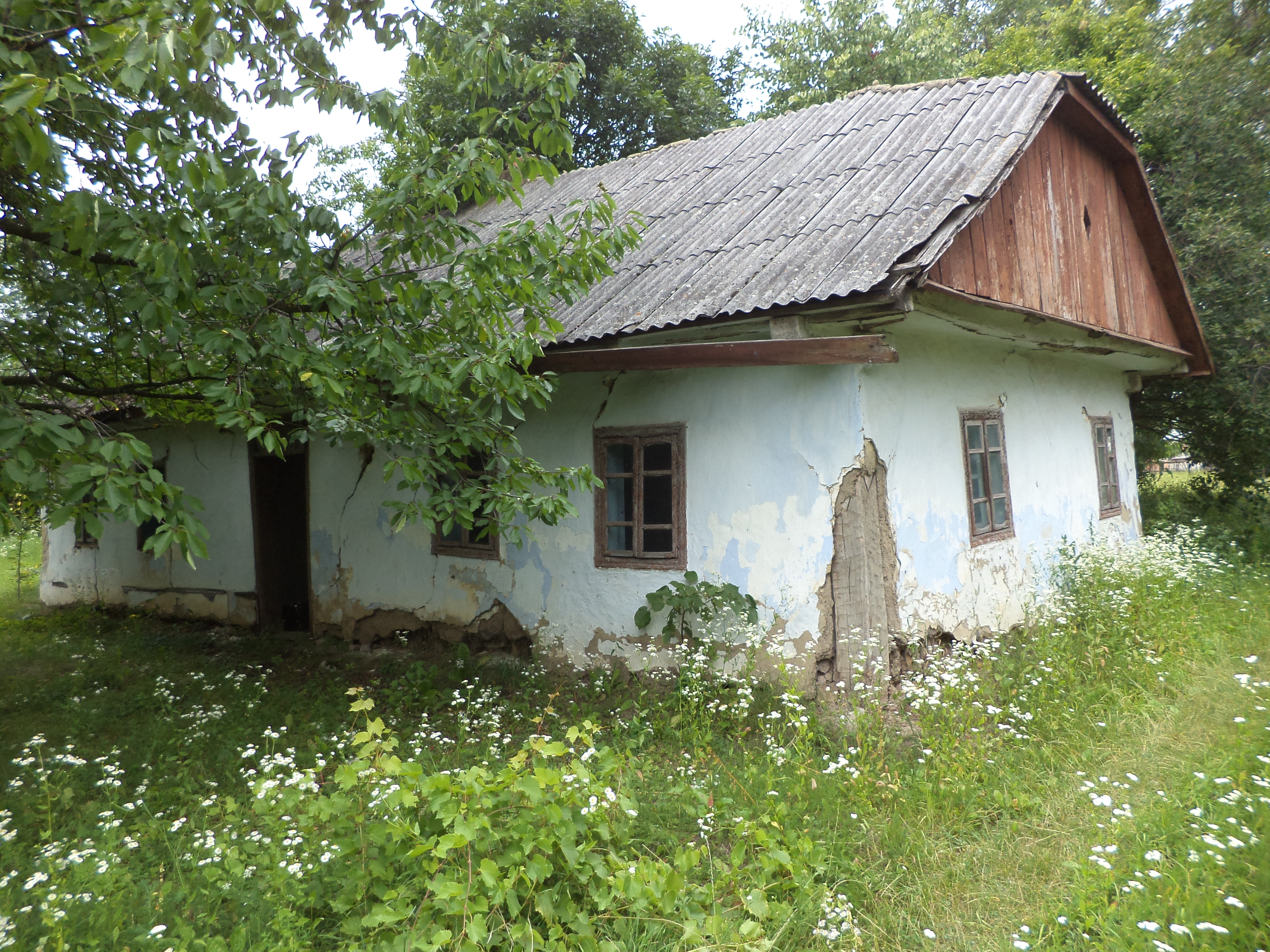 Колишня хата репресованого селянина, що до 1971 року використовувалася під школу у с. Рудківцях Новоушицького району Хмельницької області.